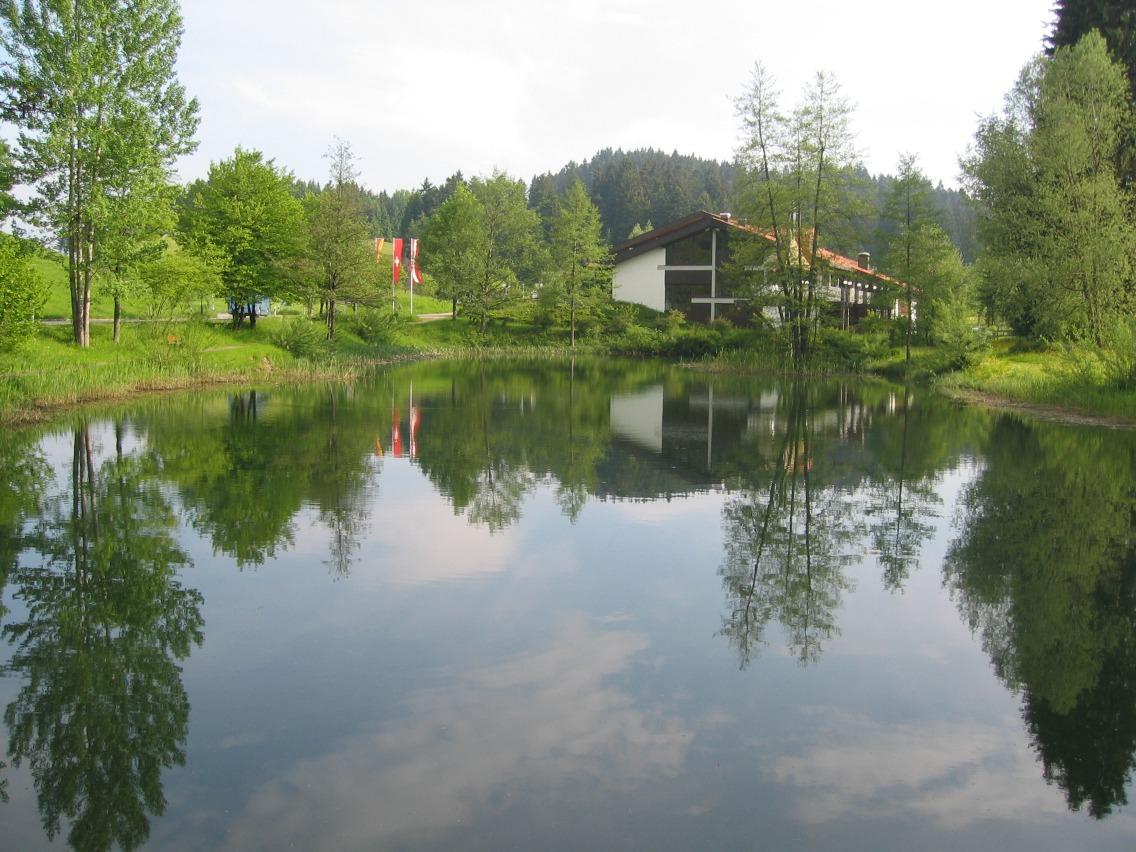 Scheidegg Allgäu Kurhaus